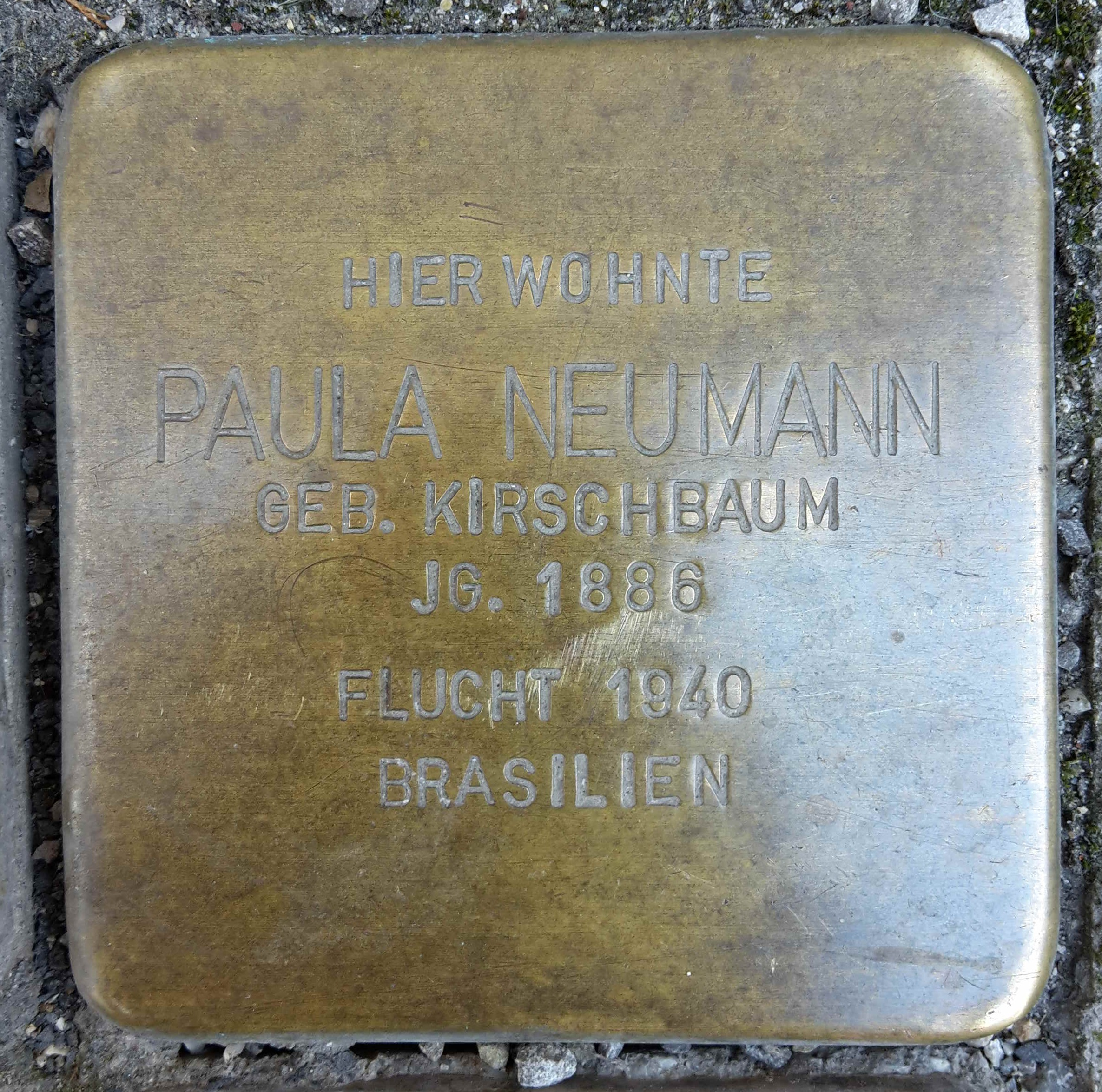 Stolperstein für Paula Neumann